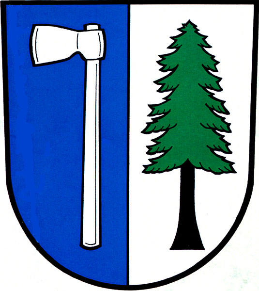 Wappen der Gemeinde Valašské Příkazy